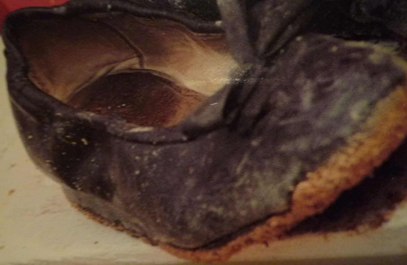 Zapatilla_aprèscorrida.JPG